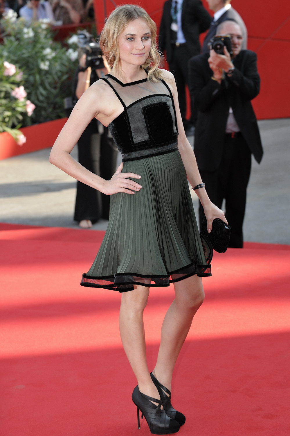 66ème Festival du Cinéma de Venise (Mostra), 10ème jour (11/09/2009) Tapis rouge avec Jared Leto, Diane Kruger, Sarah Polley et le réalisateur Jaco Van Dormel pour le film : MR. NOBODY